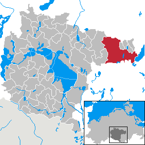 Penzlin im Landkreis Müritz, Mecklenburg-Vorpommern